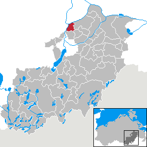 Neddemin in Mecklenburg-Vorpommern, Landkreis Mecklenburg-Strelitz